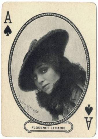 Florence La Badie